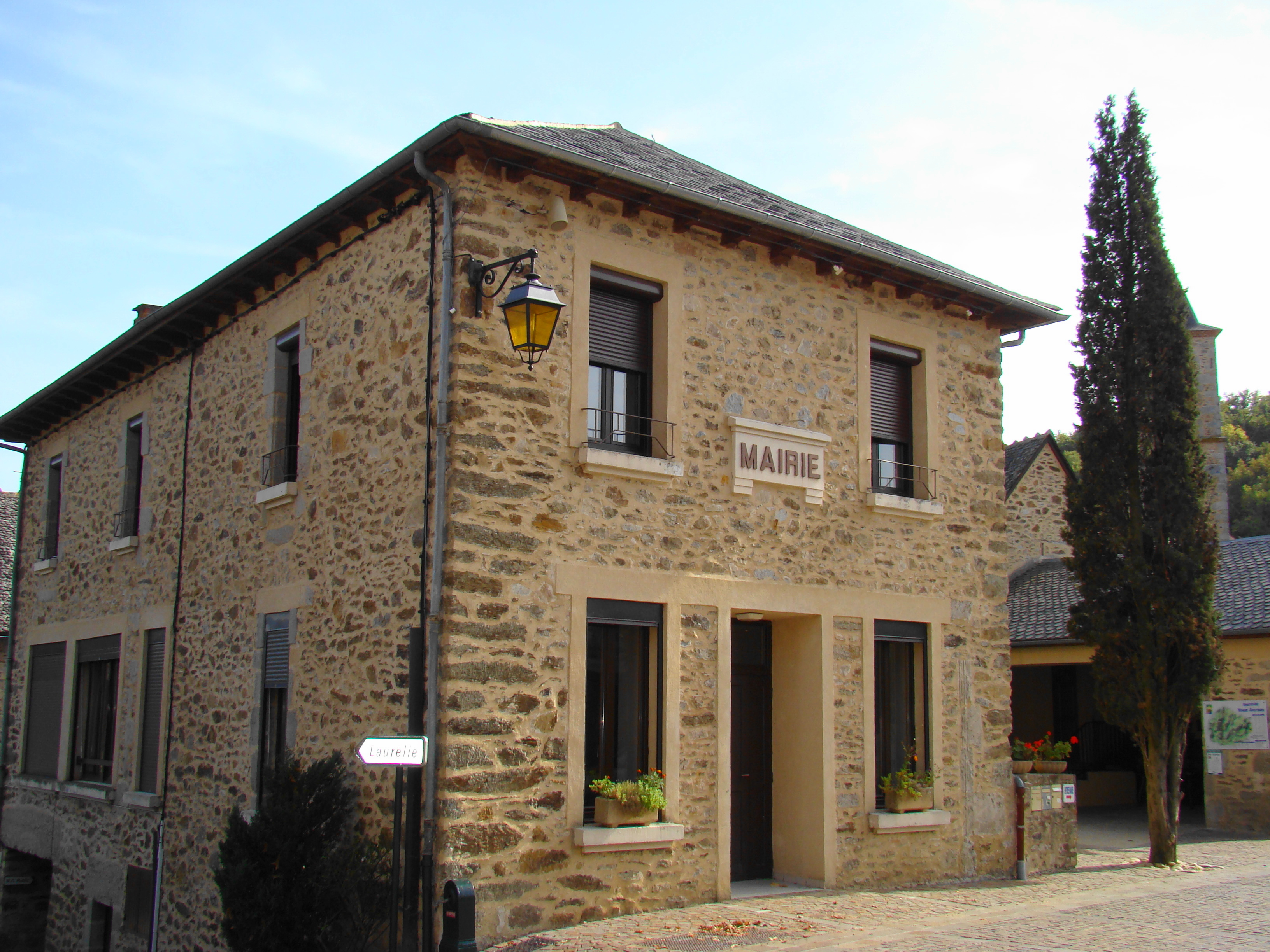 Mairie